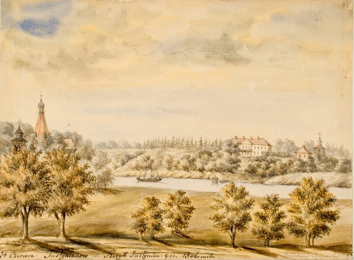 Беларуская (тарашкевіца): Юстыянаў (Justyjanaŭ), сядзіба Шчытоў (Ščyt)